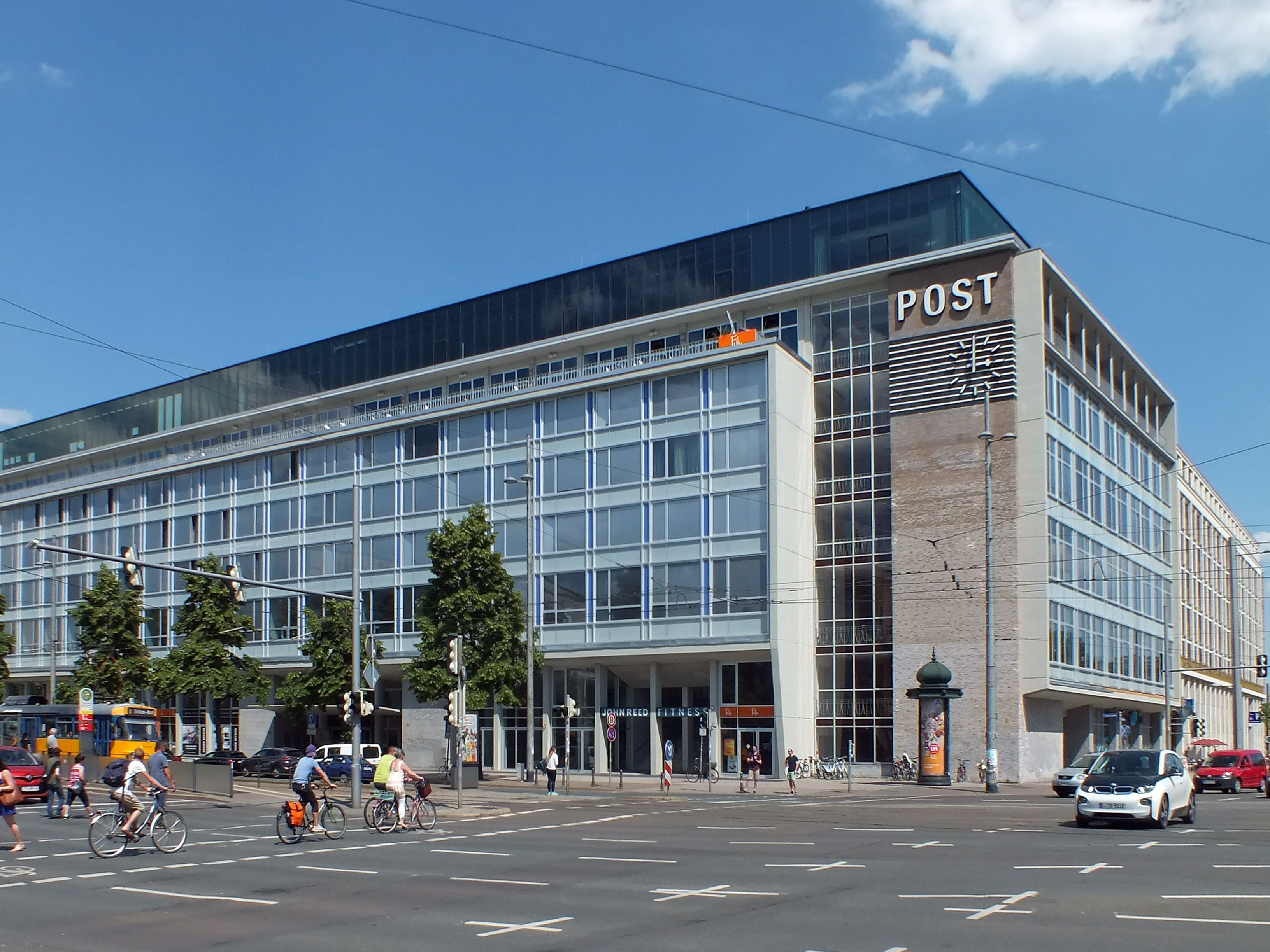 Das ehemalige Hauptpostamt in Leipzig, jetzt „Das lebendige Haus“